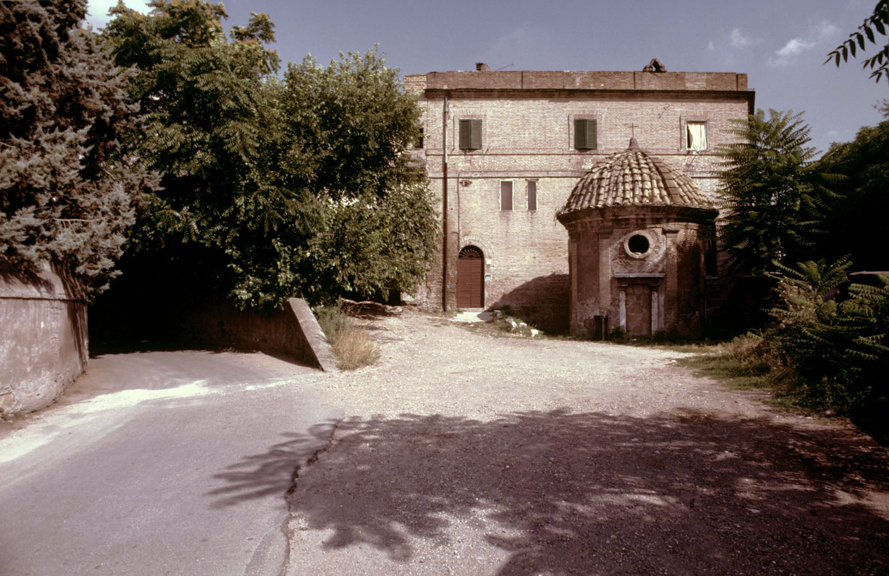 Via della Caffrella e edicola del Cardinale Pole